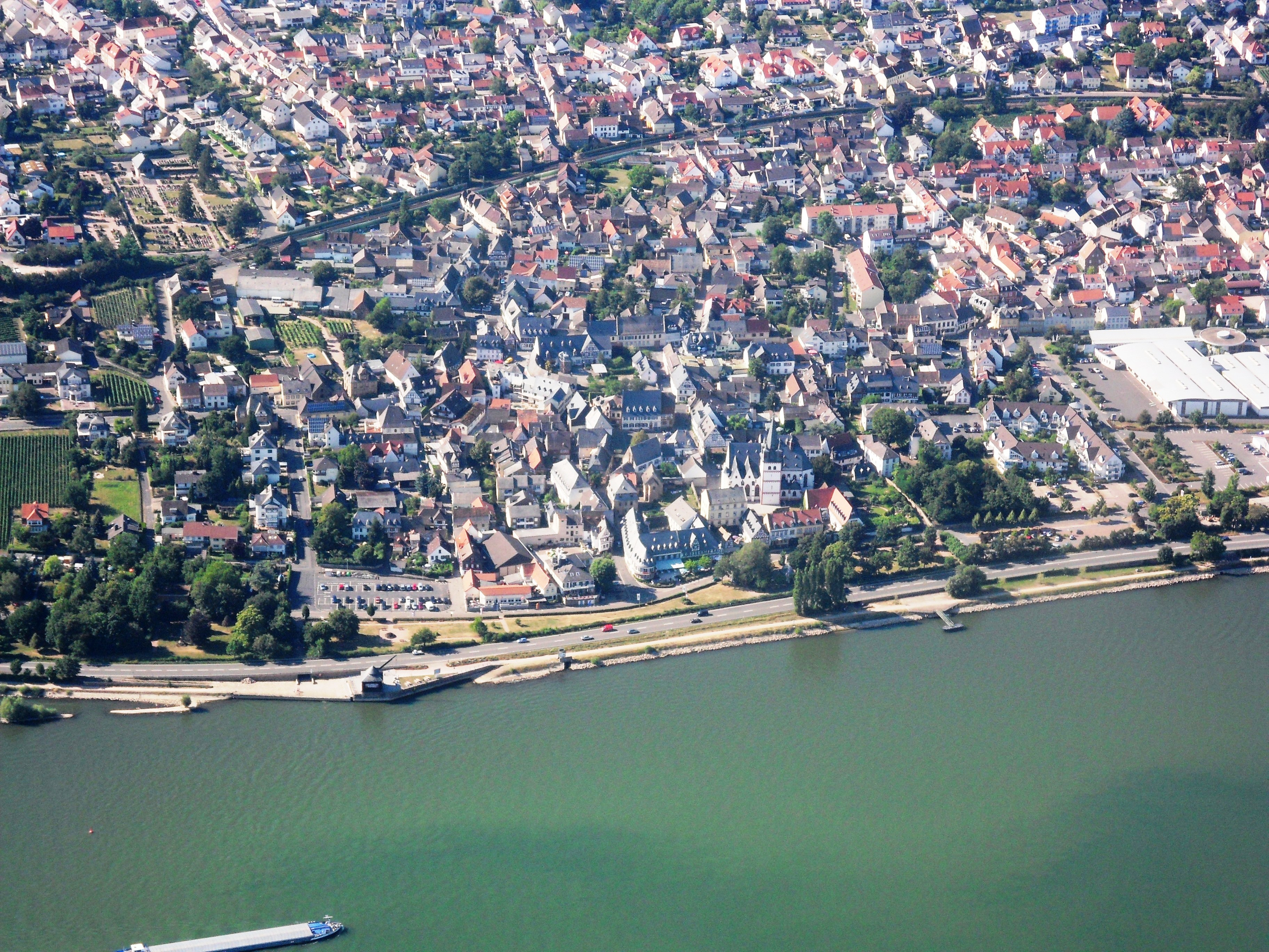 Vogelperspektive auf die Ortsmitte Oestrich von Oestrich im Rheingau. Am Rheinufer der historische Oestricher Kran.